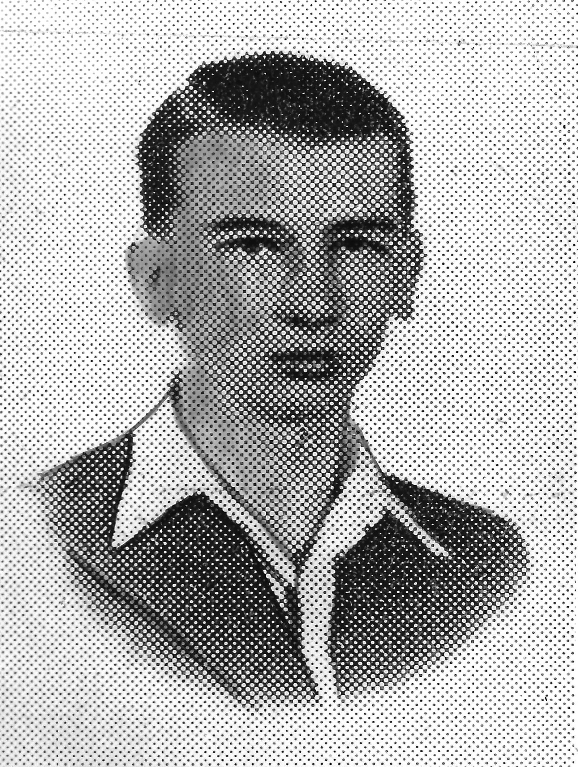 Żołnierz Odcinka I Wachlarza